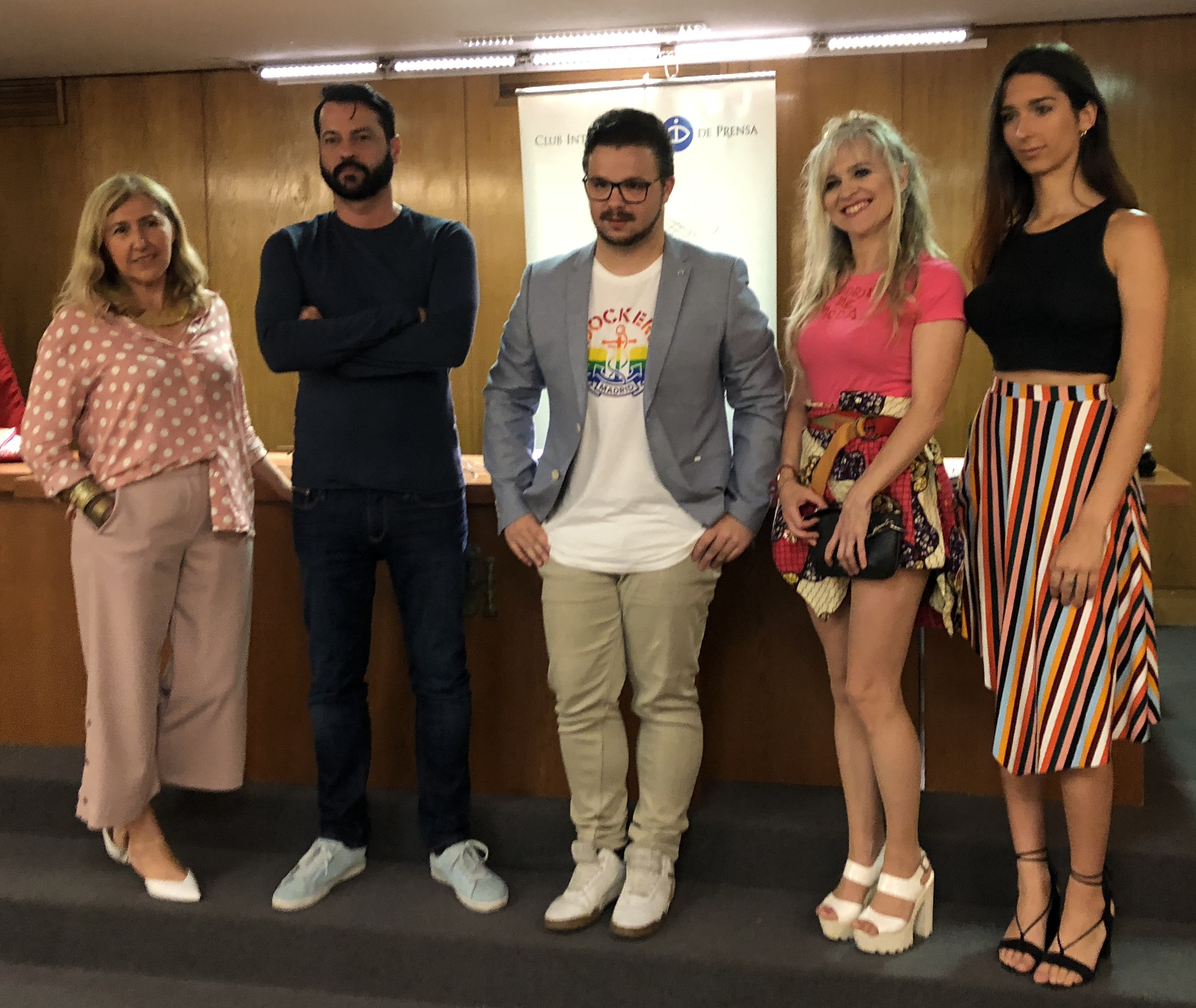 Presentación de "Dríade" en el Club Internacional de Prensa de Madrid convocados por la Asociación de Prensa y Comunicación LGTB+ en la imagen Lola Rodríguez, modelo trans, María Lafuente, diseñadora, David Enguita, Pte. Asociación Prensa y Comunicación LGTB+, Sergio Gallardo Director de Lal la buya